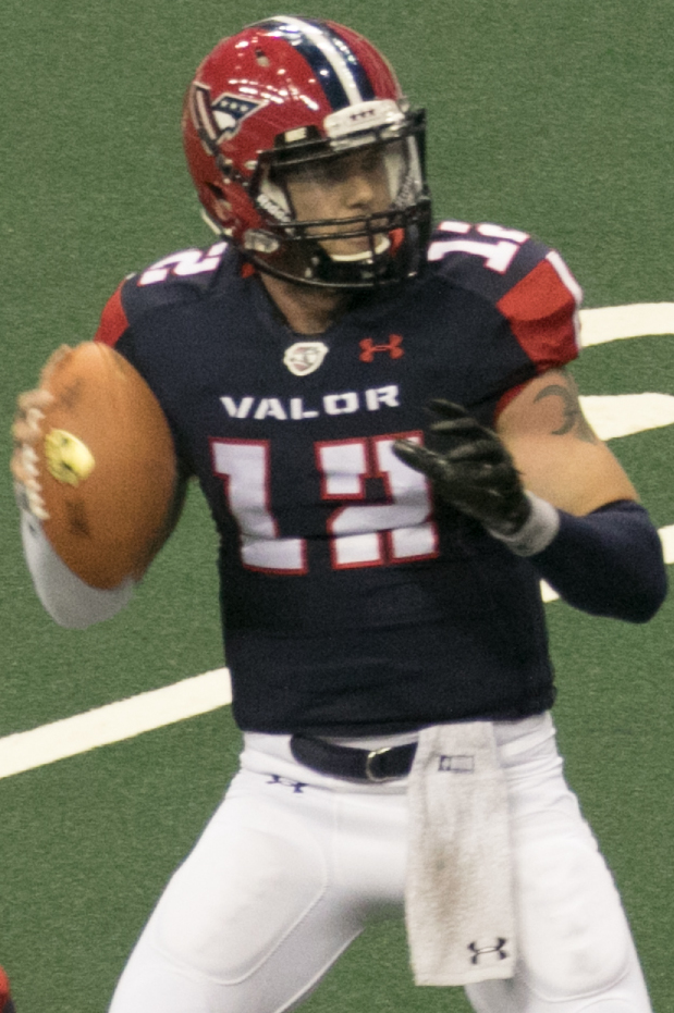 Valor 47/ Philadelphia Soul 48